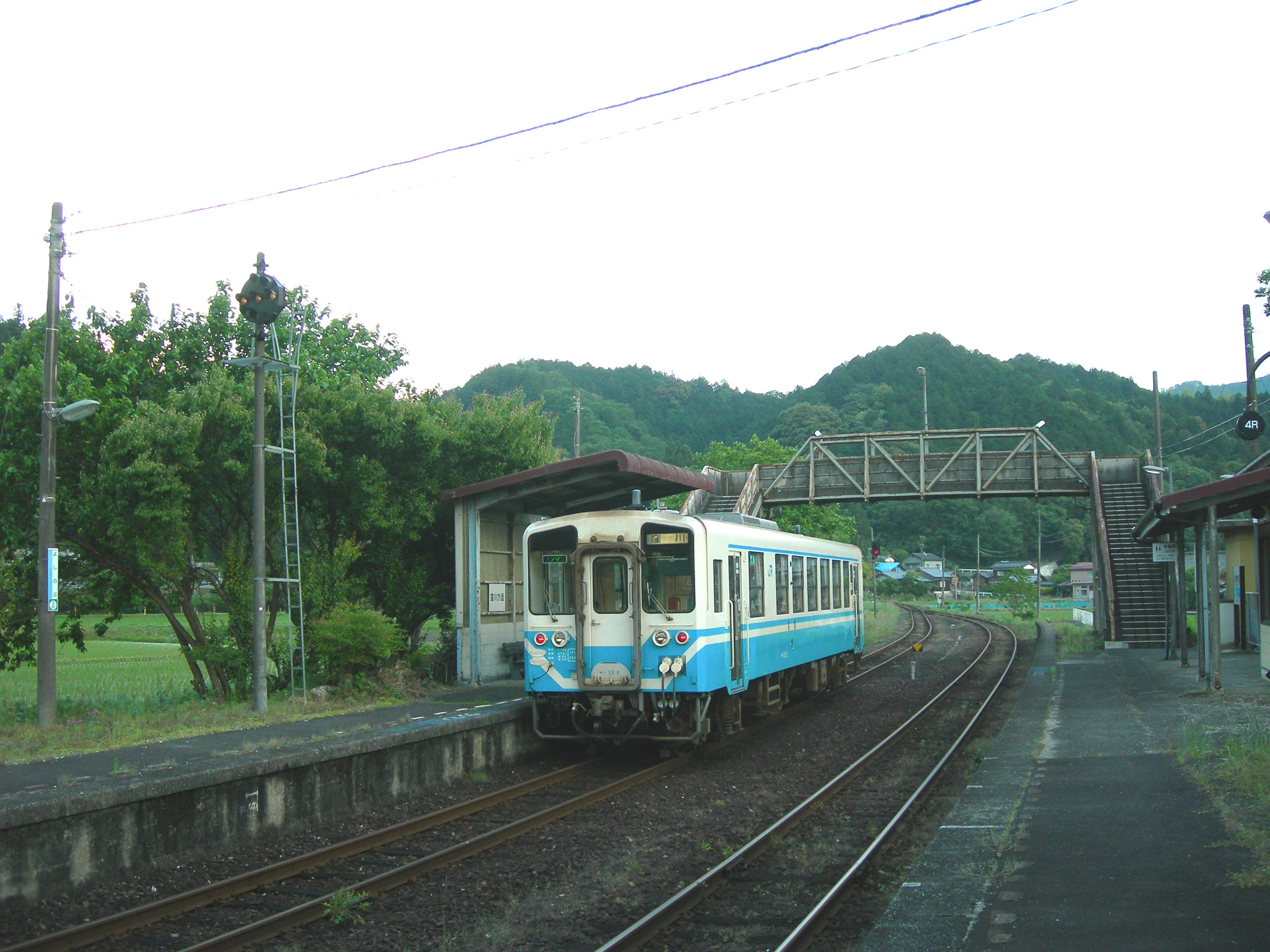 予土線 吉野生駅 ホーム